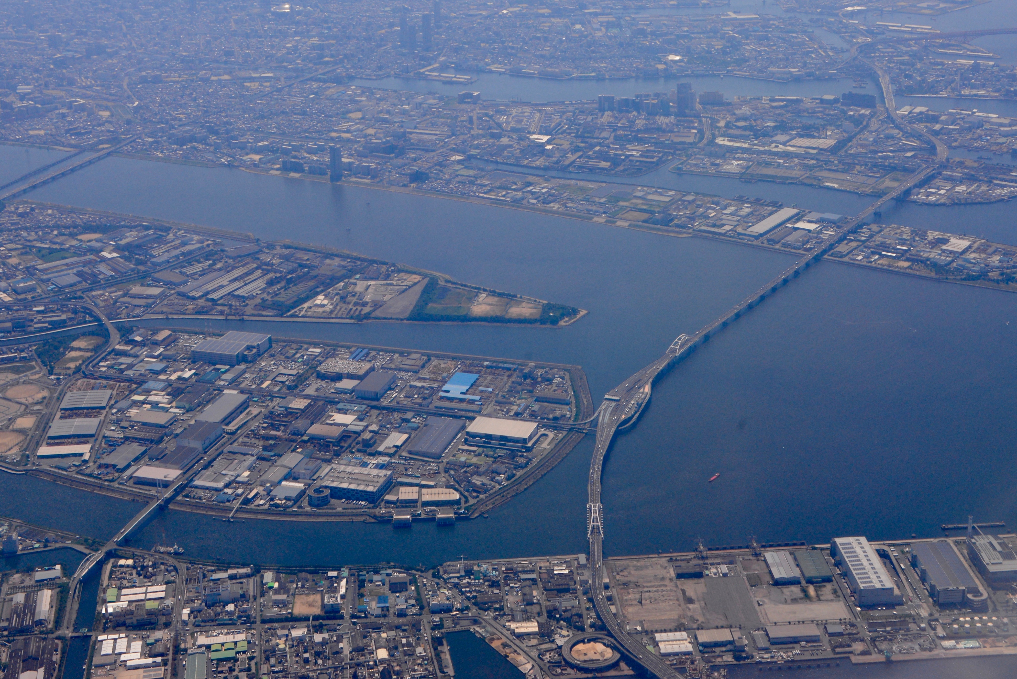 阪神高速5号湾岸線中島付近